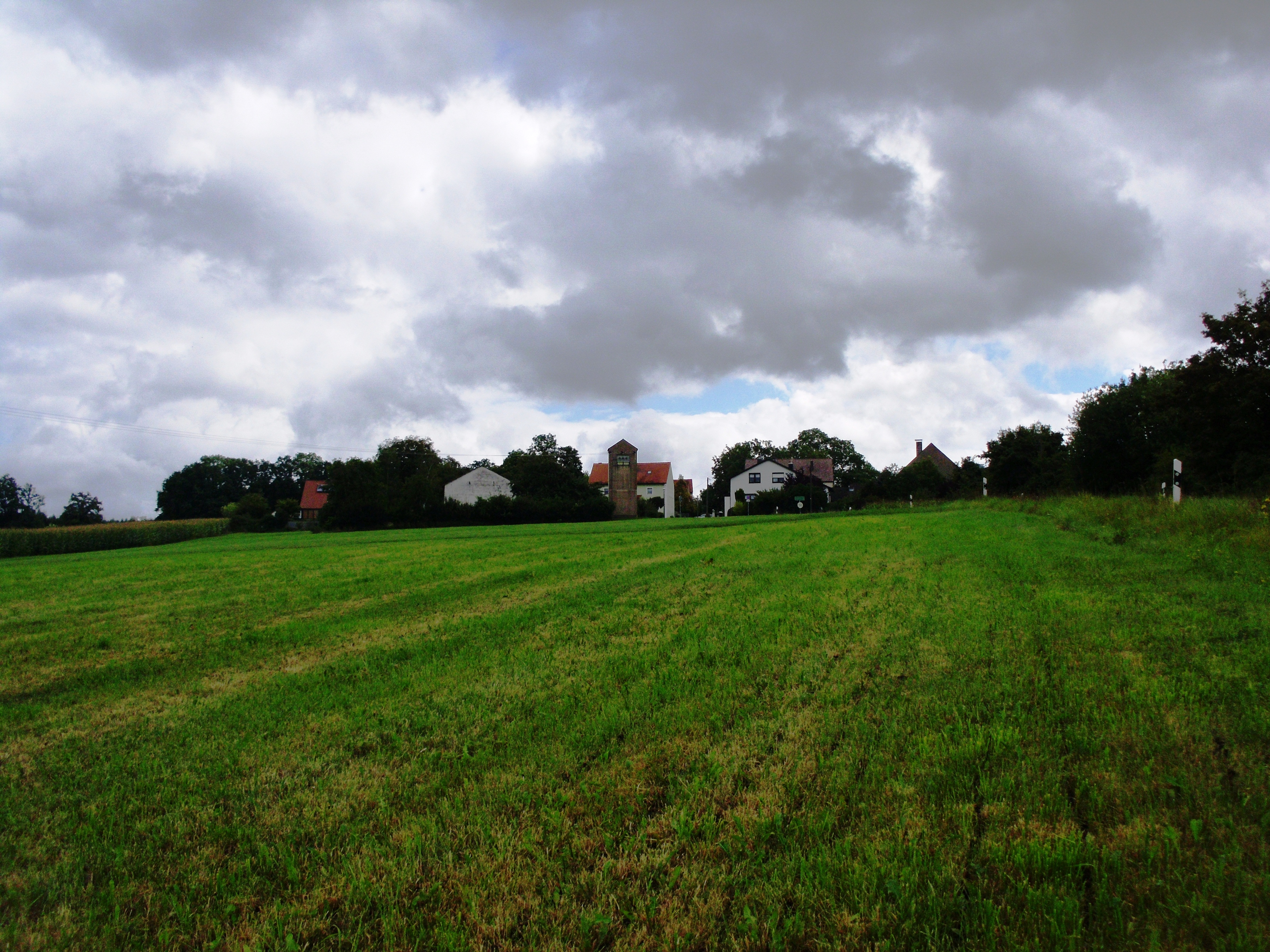 Neufang, Ortsteil von Treuchtlingen im Landkreis Weißenburg-Gunzenhausen